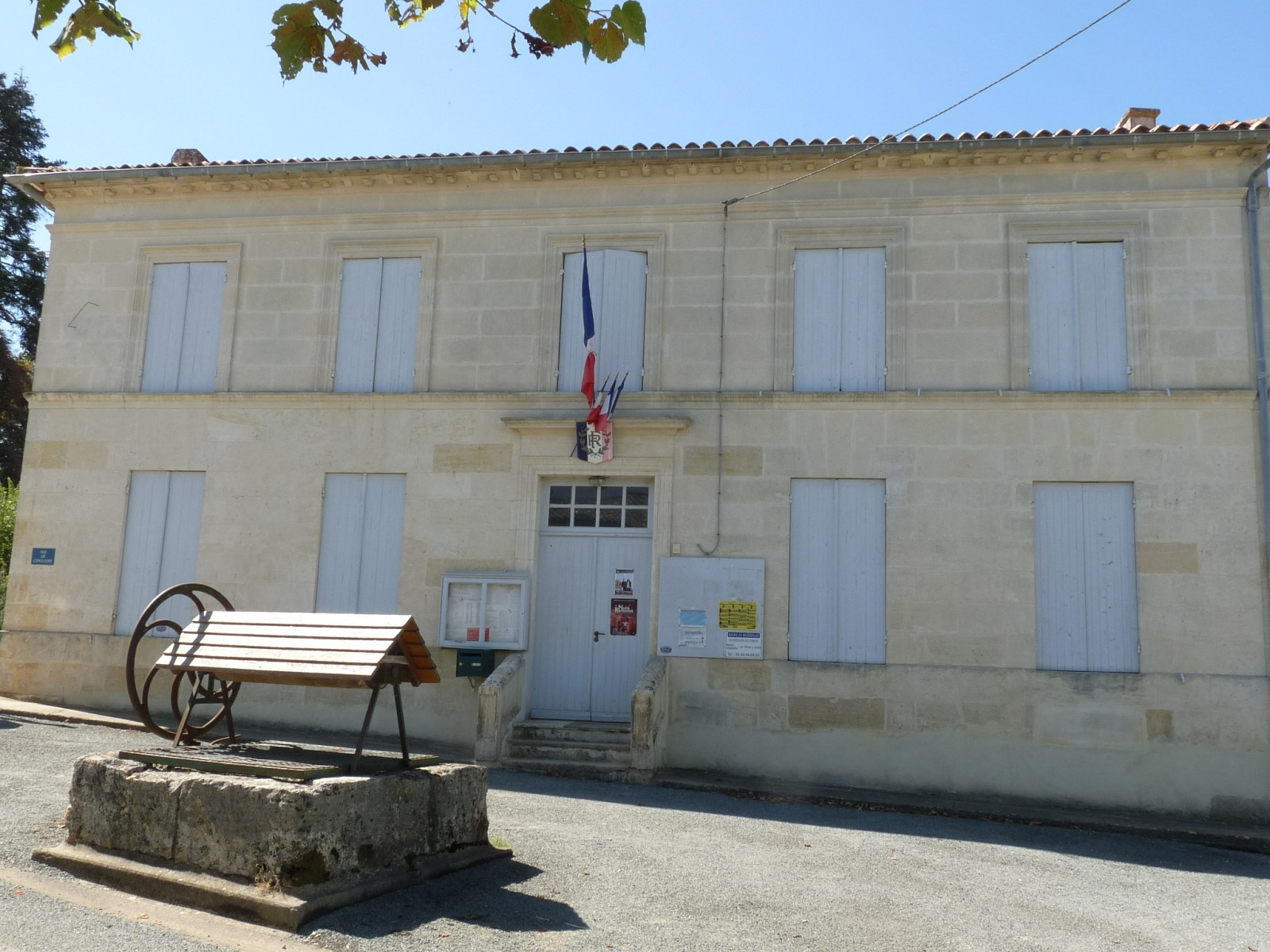 Mairie de Mazerolles (aux Vallières), Charente-Maritime, France